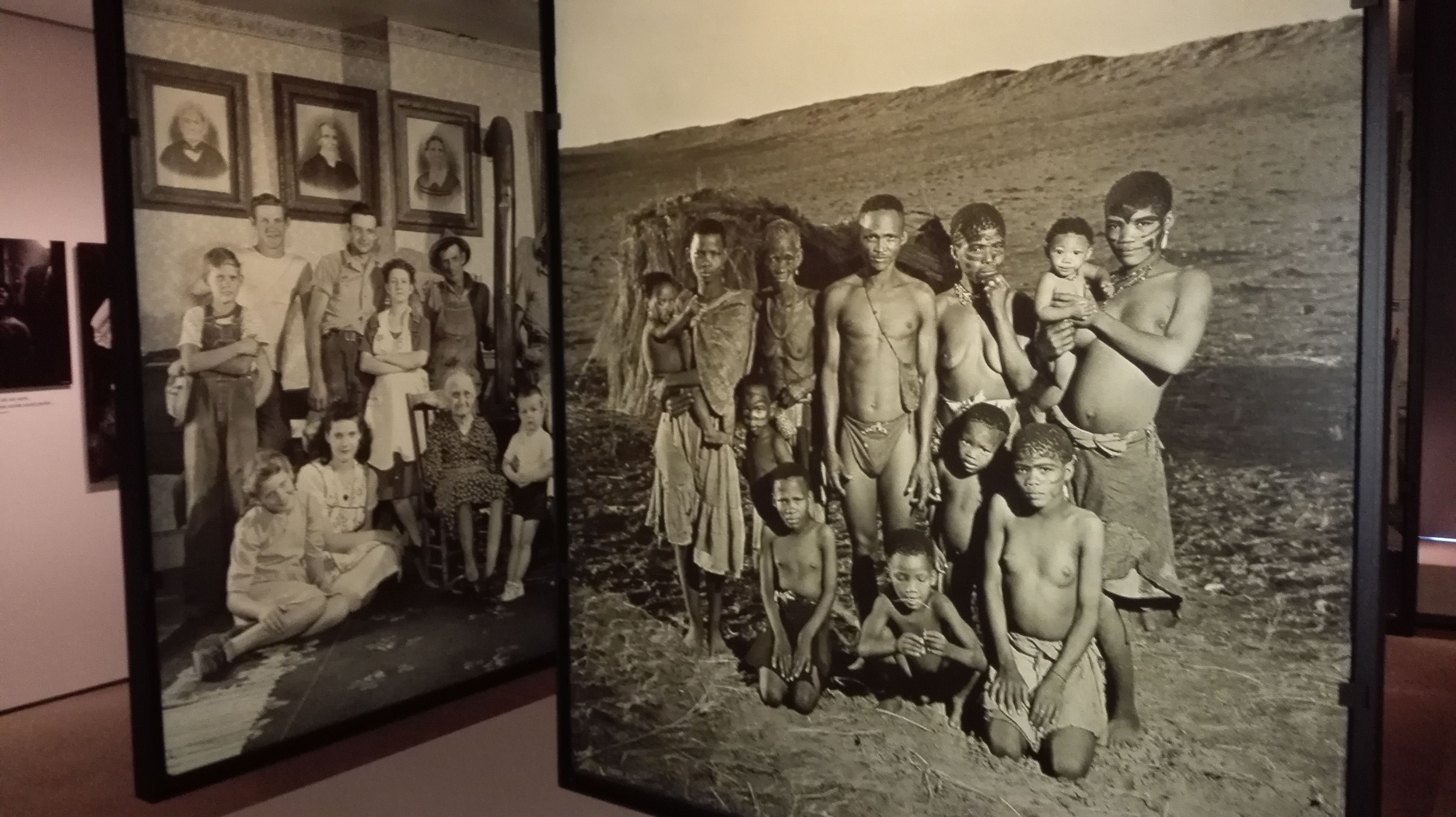 Clervaux, Luksemburgio.